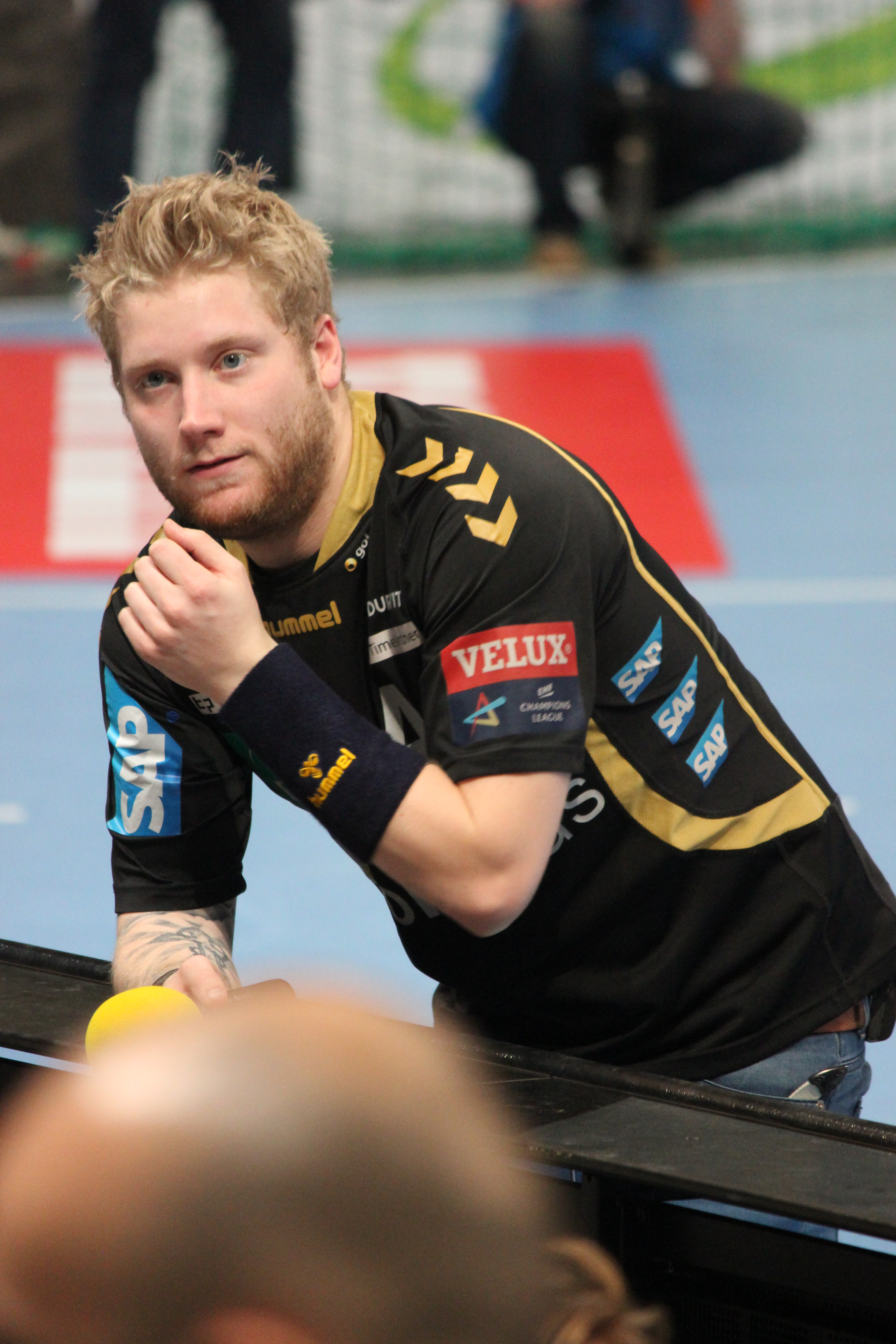 Kevin Gerwin nach dem VELUX EHF Champions League Spiel der Rhein Neckar Löwen gegen den FC Barcelona (Handball) im Jahr 2014 in der SAP Arena in Mannheim